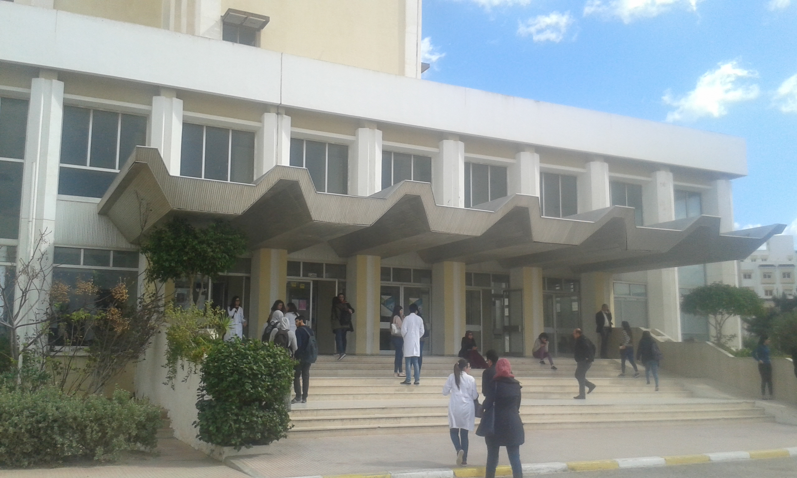 Ceci est la photo des portes d'entrée à la Faculté de Médecine de Sfax